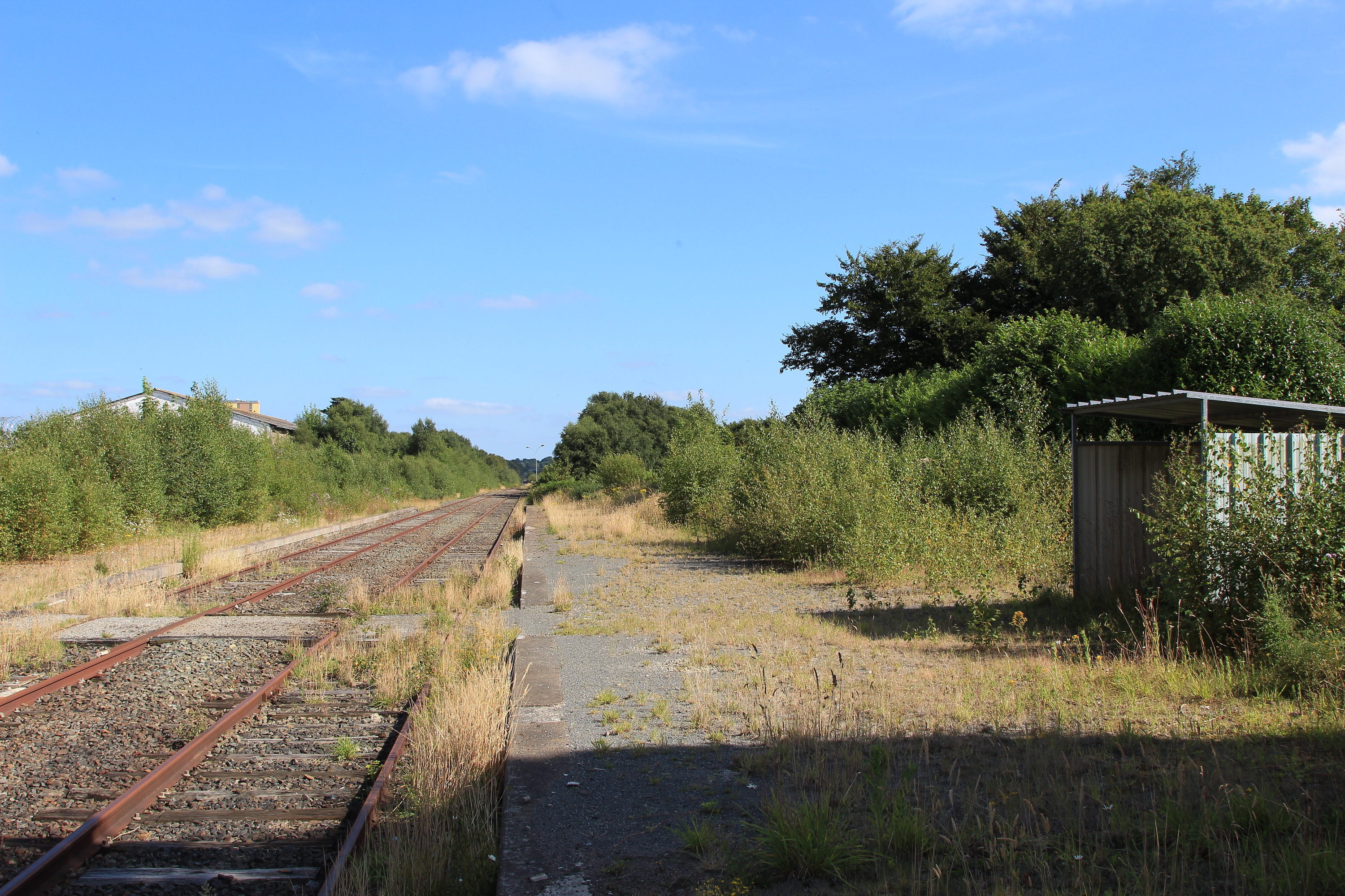 La gare d'Uzel vue des voies en direction de Loudéac